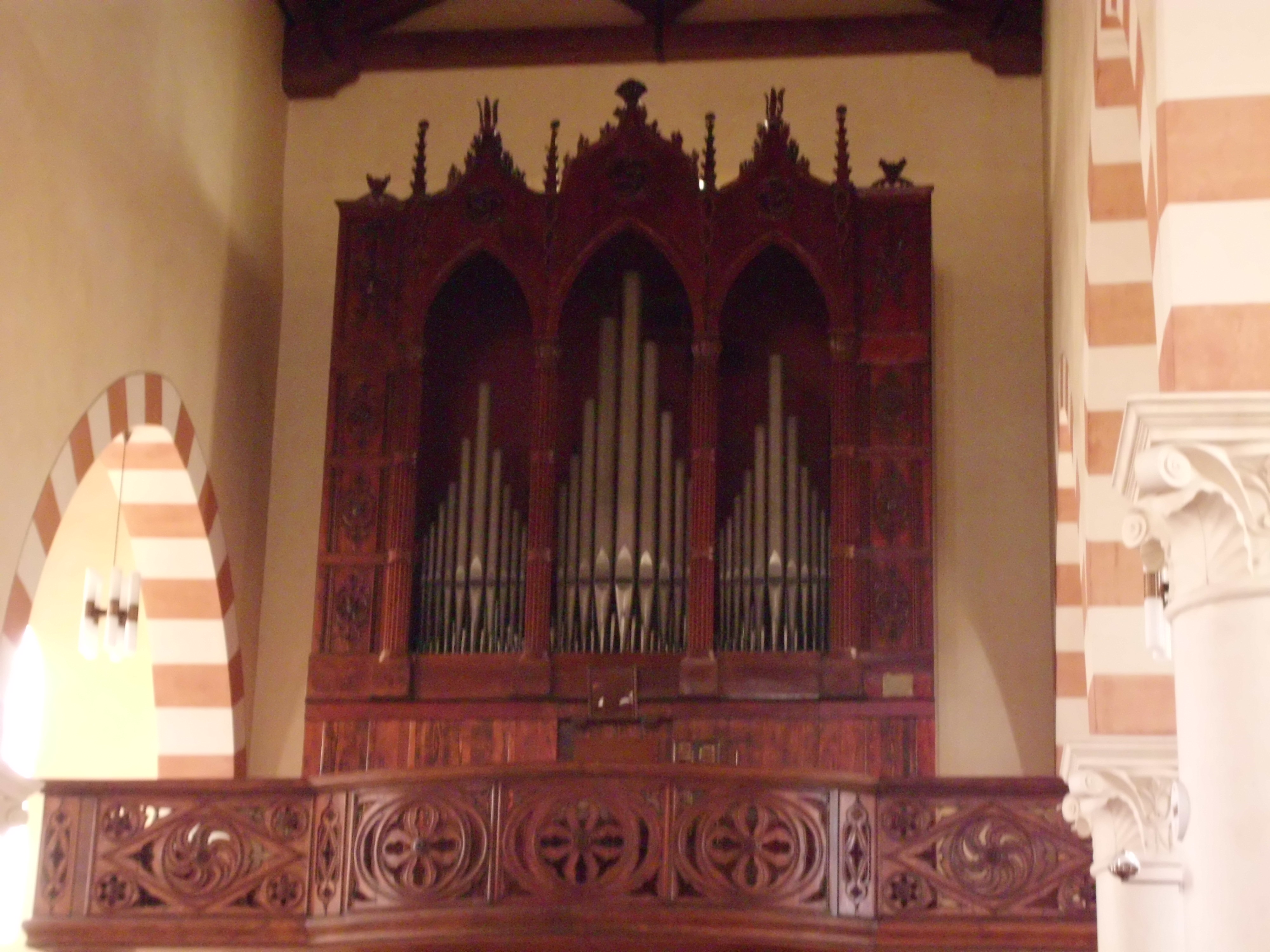 organo Bazzani della chiesa di Maerne